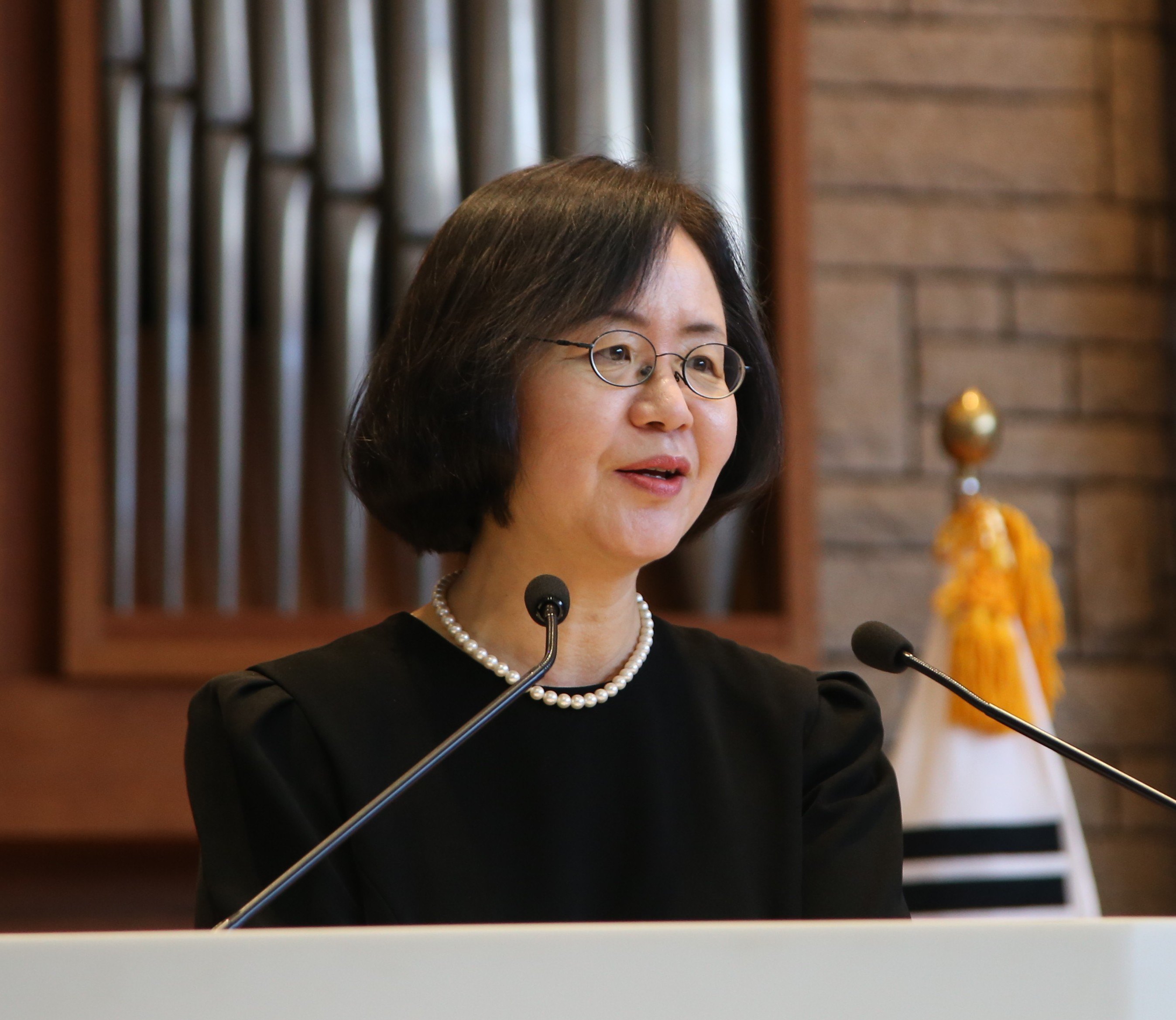 정미현 교수 연세대학교 신학과